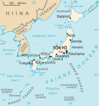 Jaapani kaart